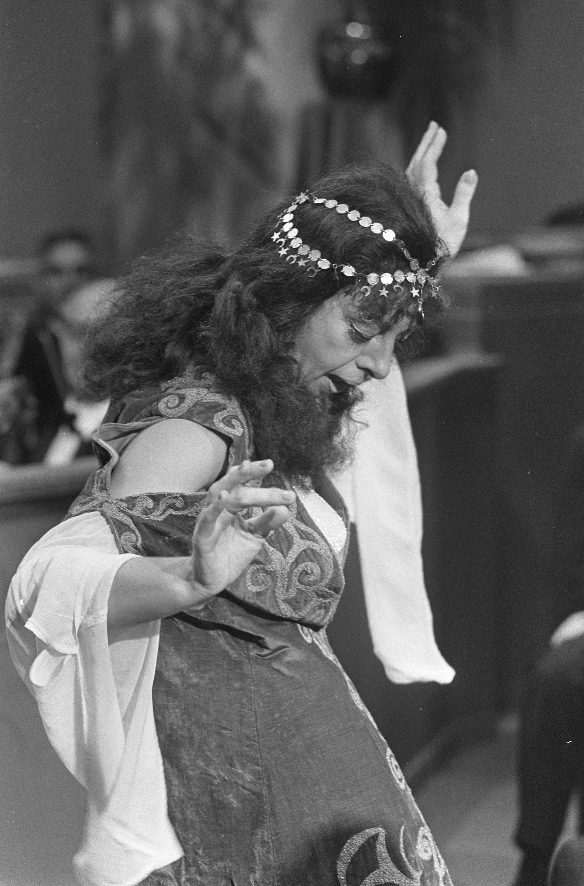 Hetty Blok als Turkse gastarbeidster. VPRO TV-programma "Zoals de ouden zongen, piepen de jongen". Datum: 4 oktober 1968